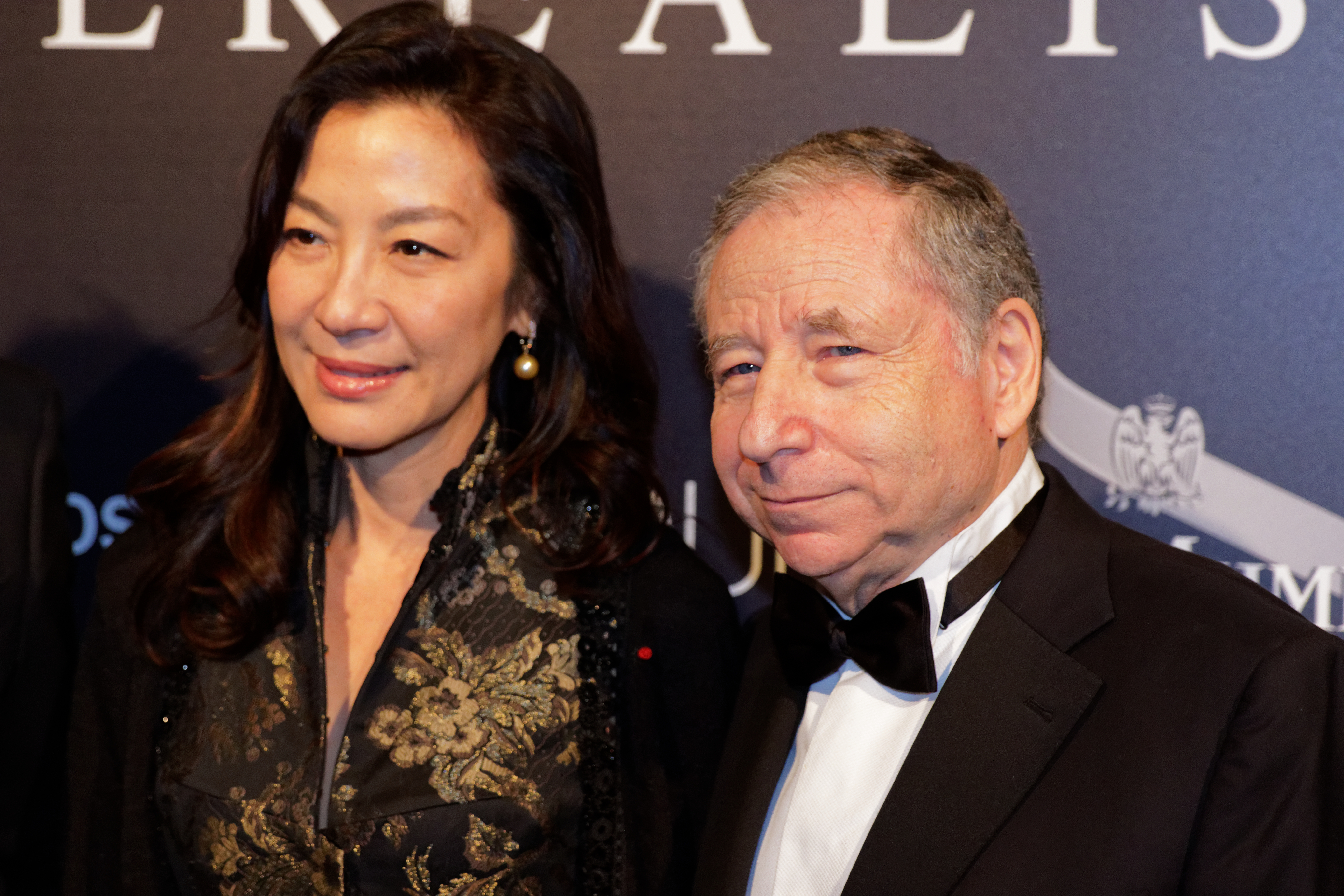 Photocall du festival automobile international 2016.